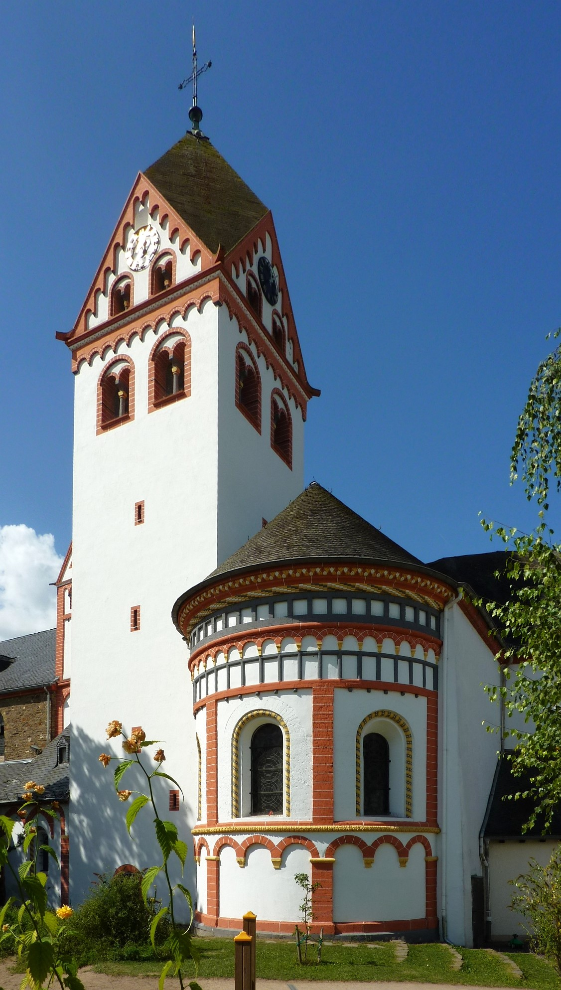 St. Medardus (Bendorf)